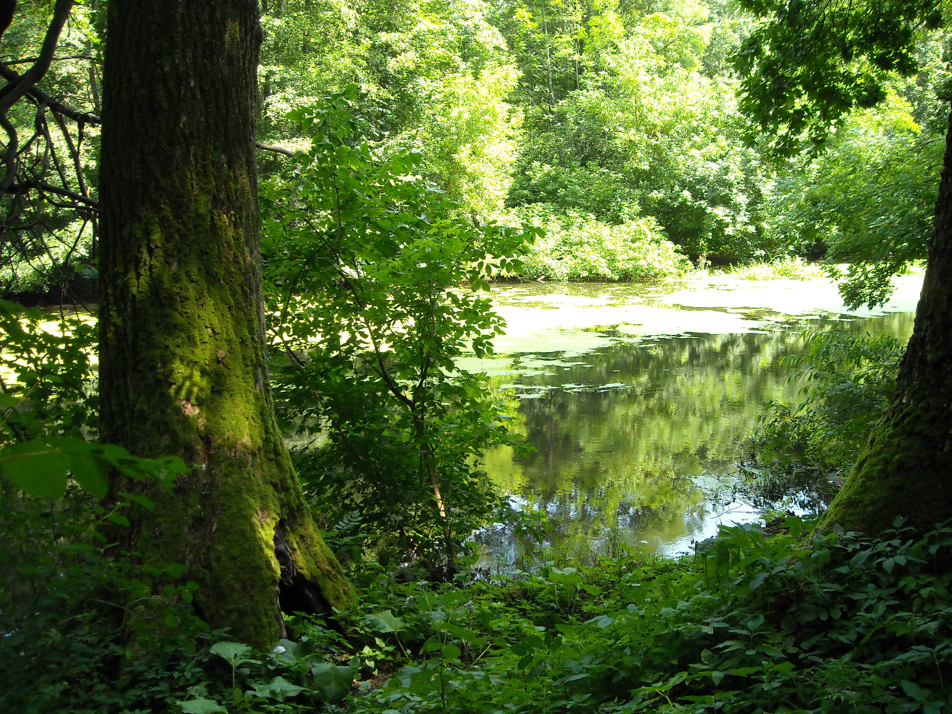 Беларуская (тарашкевіца): Палацава-паркавы комплекс Козелаў-Паклеўскіх. в. Красны Бераг This is a photo of Belarusian heritage monument. Reference number: 312Г000324 ( WLM)